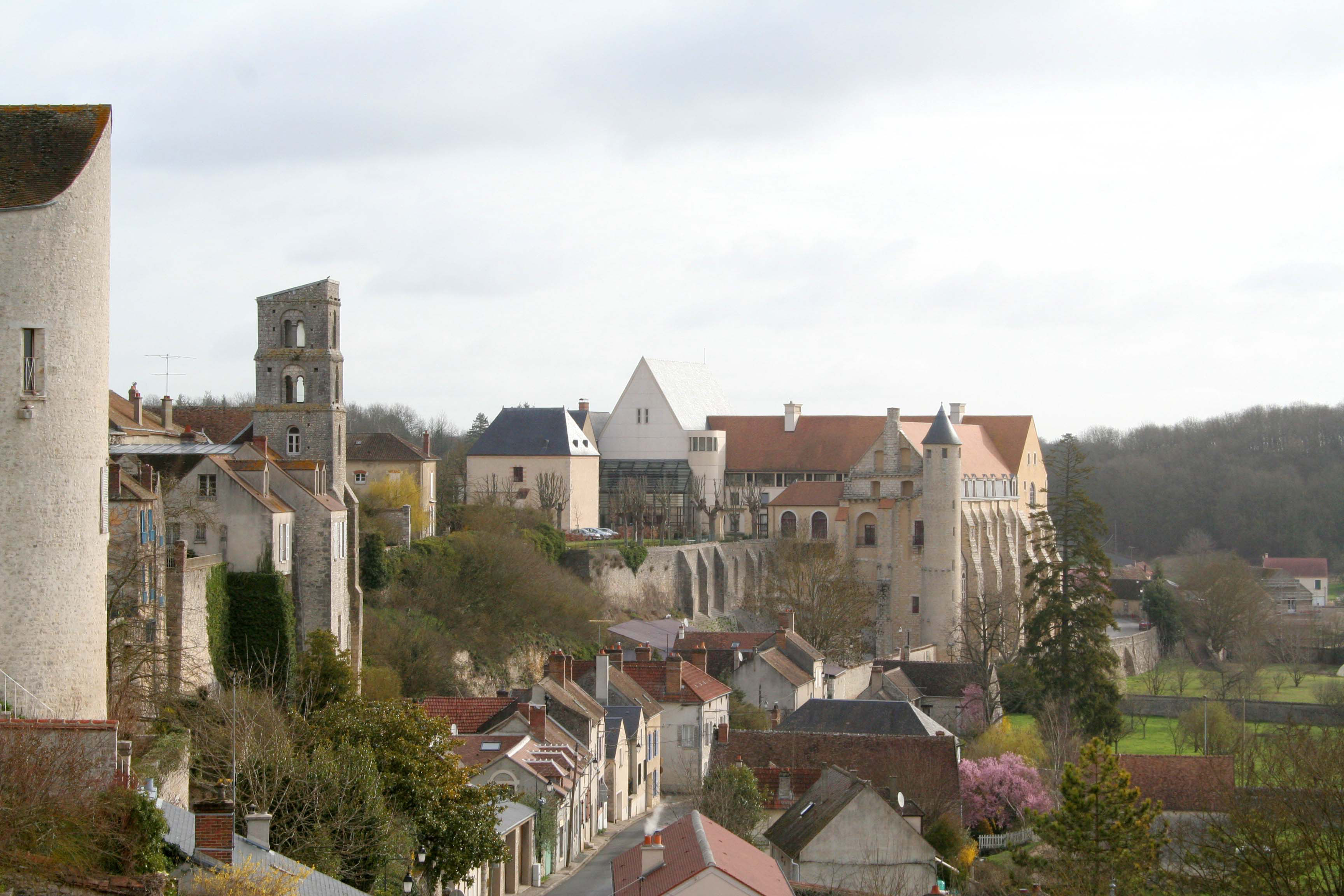 Château-Landon (Seine-et-Marne), Tour Saint-Thugal et abbaye Saint-Séverin (aujourd'hui maison de retraite départementale) vues depuis la place du Larry.